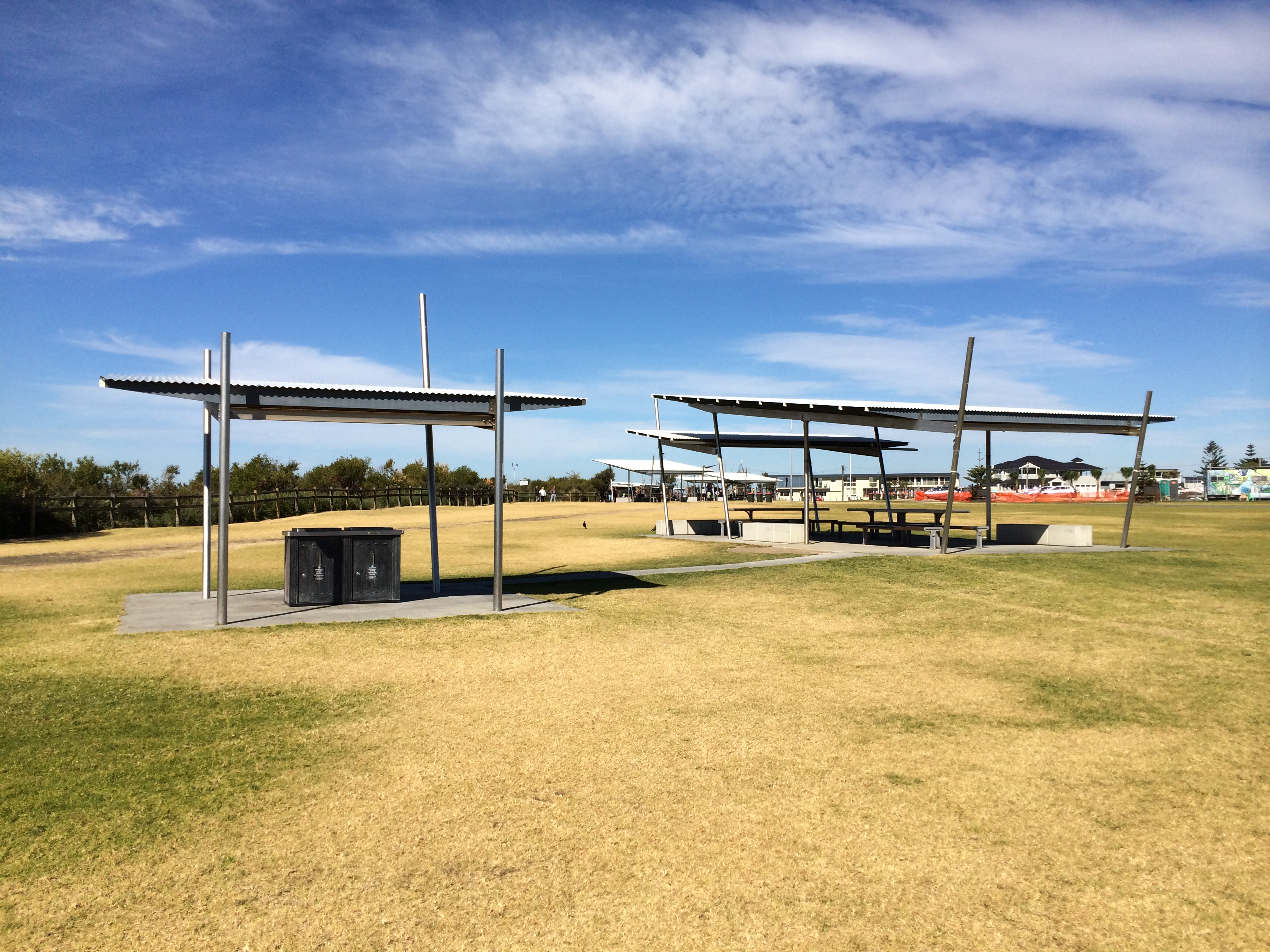 Товраджі Парк у серпні 2014 року. Товраджі, Новий Південний Уельс, Австралія